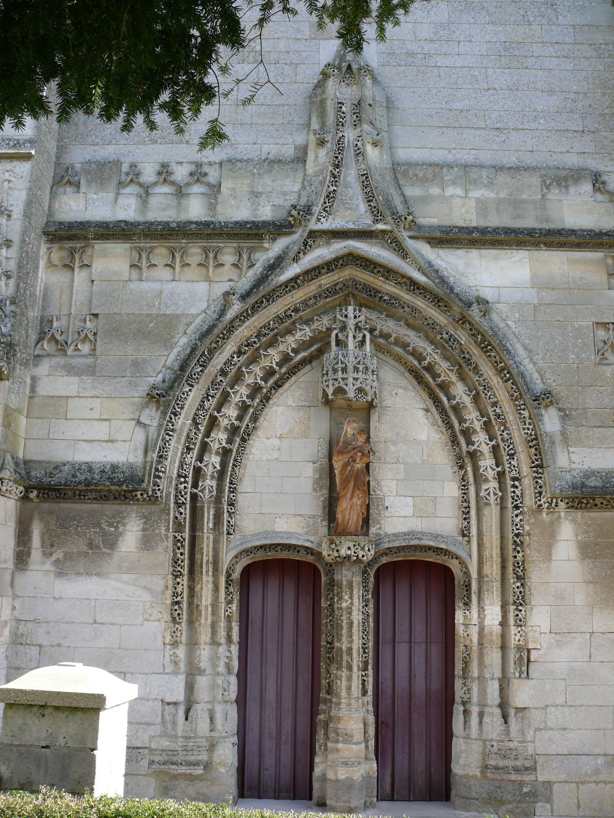 Le portail de l'église Saint-Denis de Poix-de-Picardie